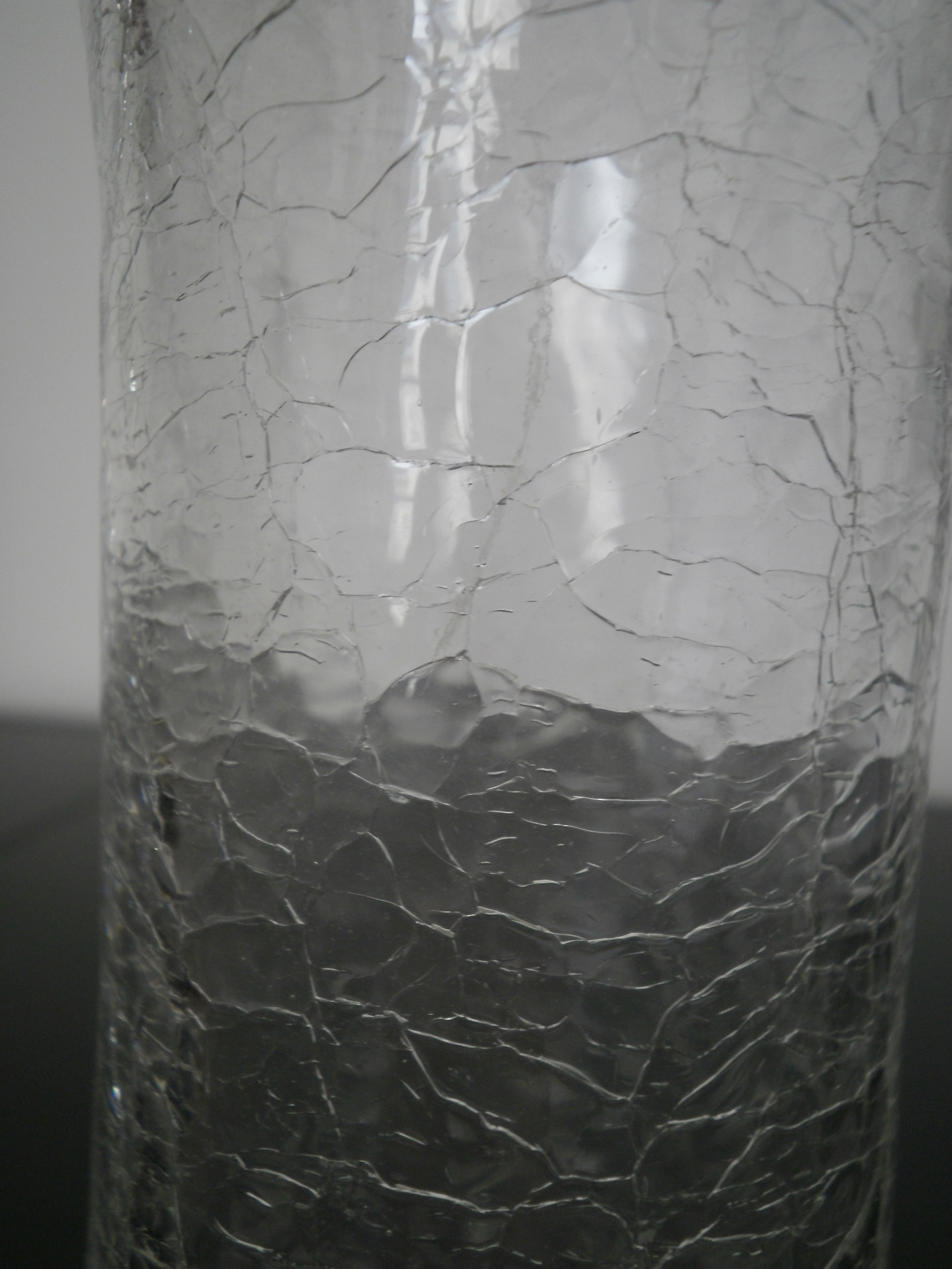 détail d'un vase dont le matériau est du "verre craquelé"